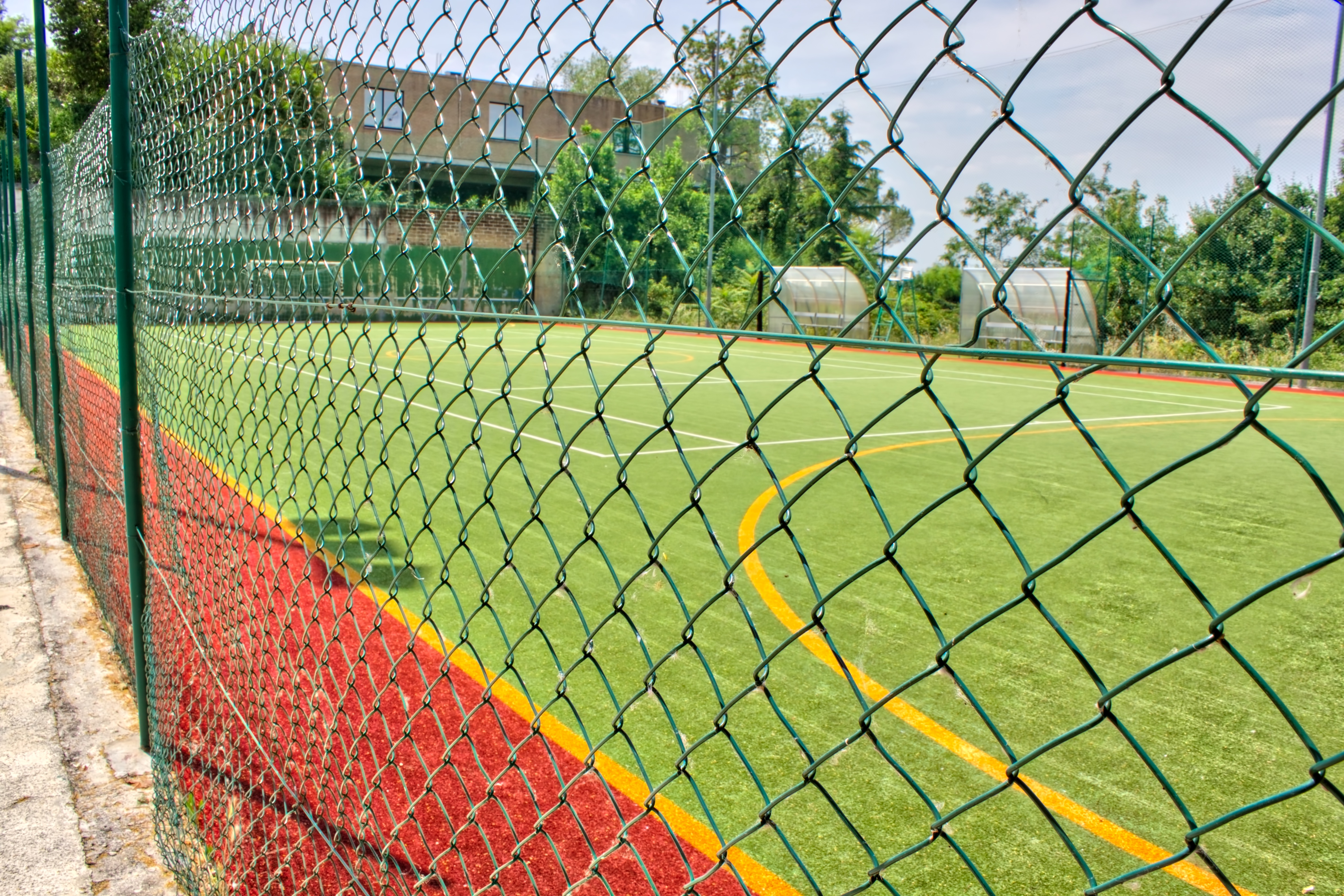 Campo di Calcetto e Tennis in sintetico